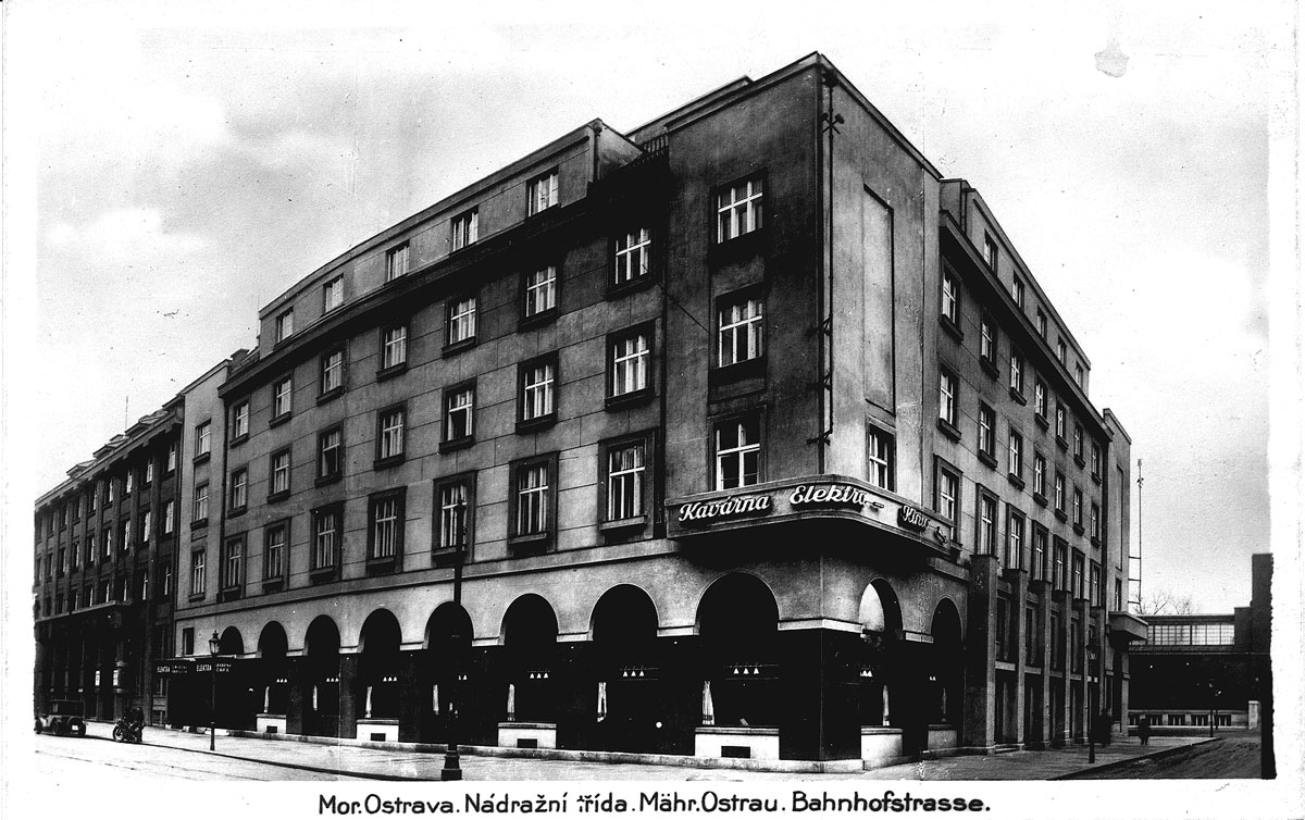 Kavárna Elektra v Moravské Ostravě počátkem 20. století.